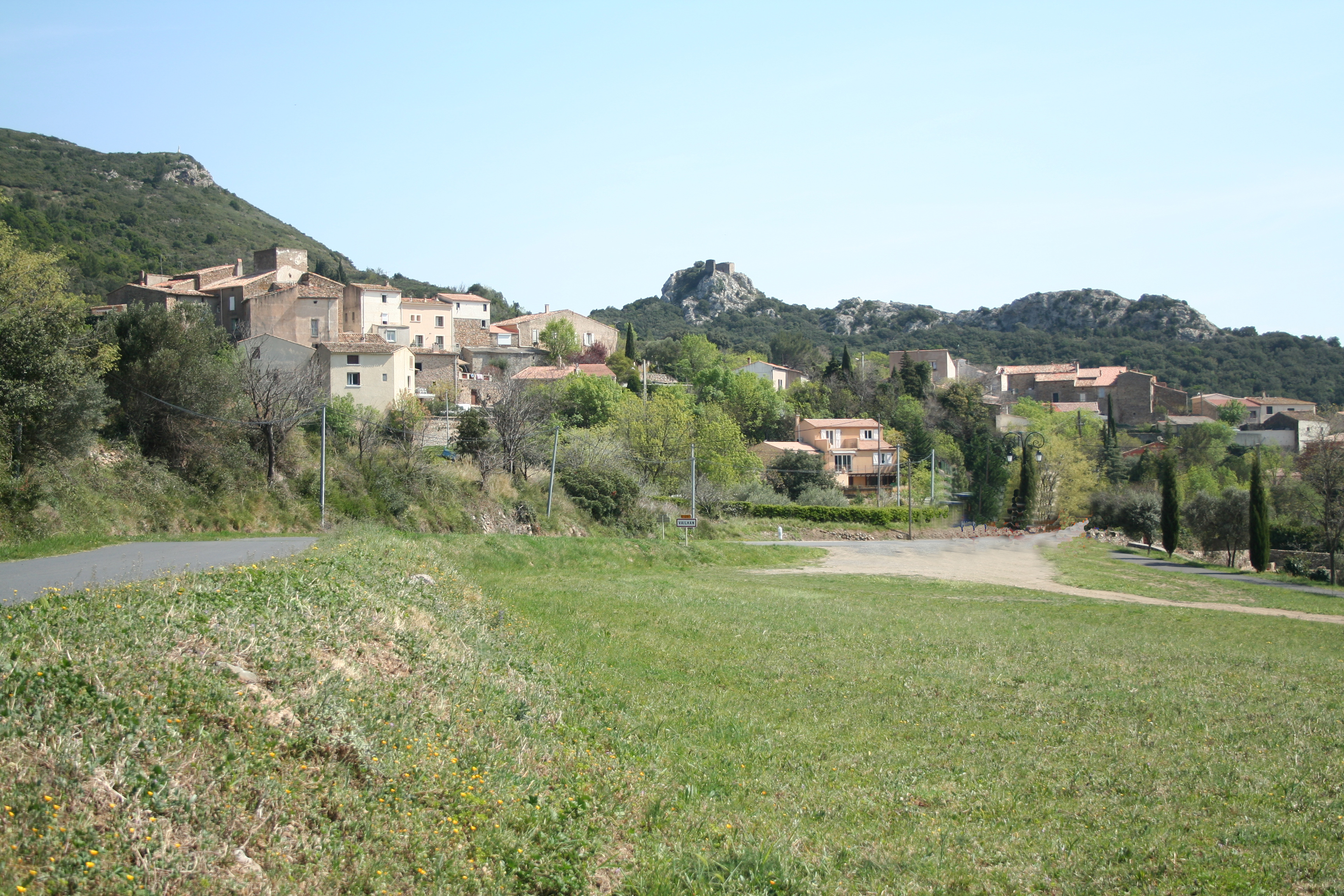 Vailhan (Hérault)- vue générale.